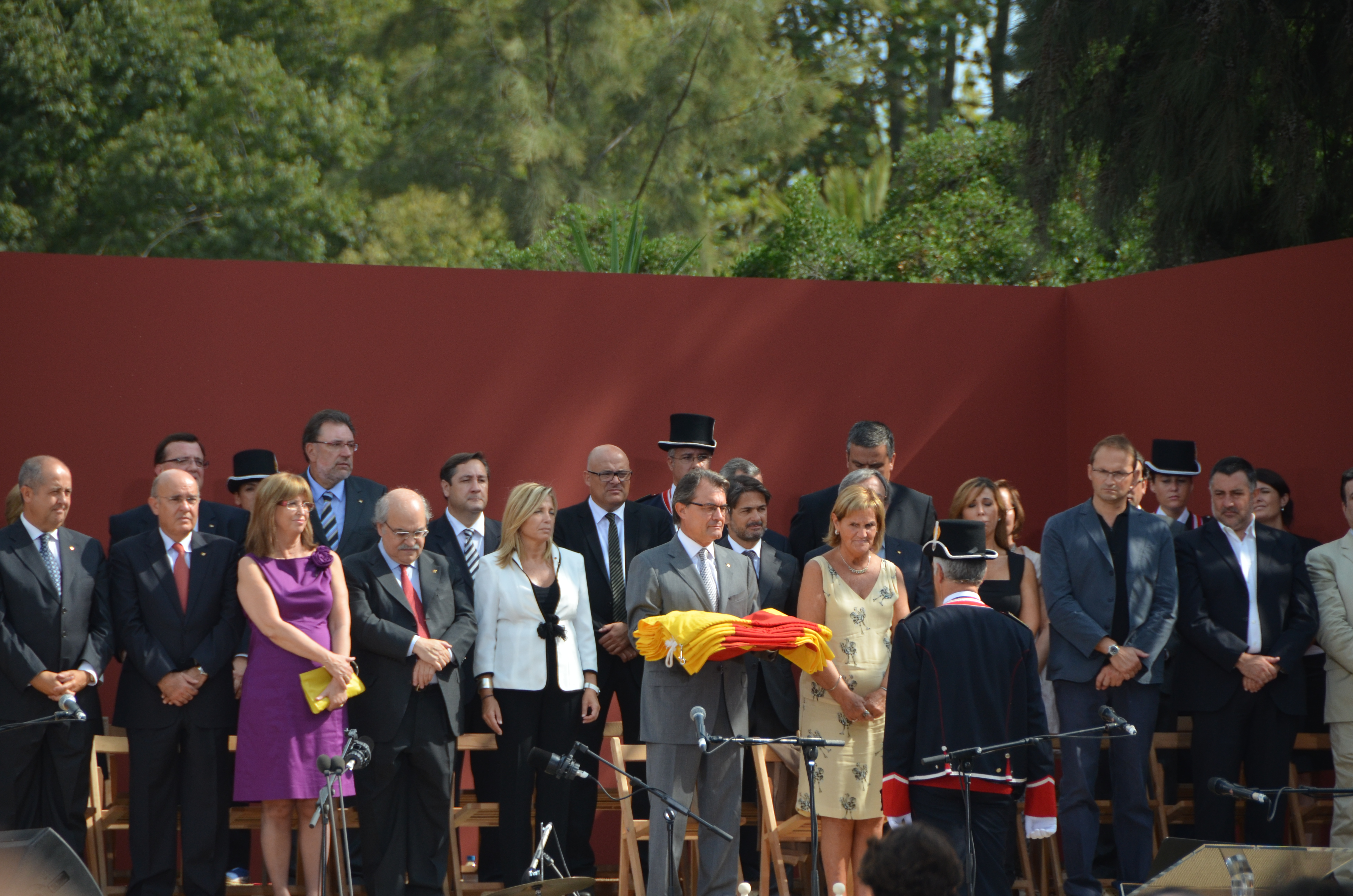 11s2012 Parc Ciutadella senyera de Capmany